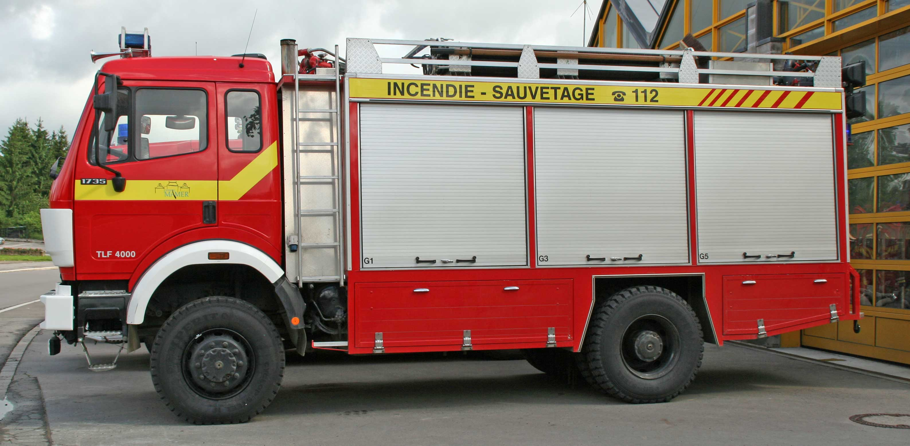 Pomp Mamer TLF 4000.